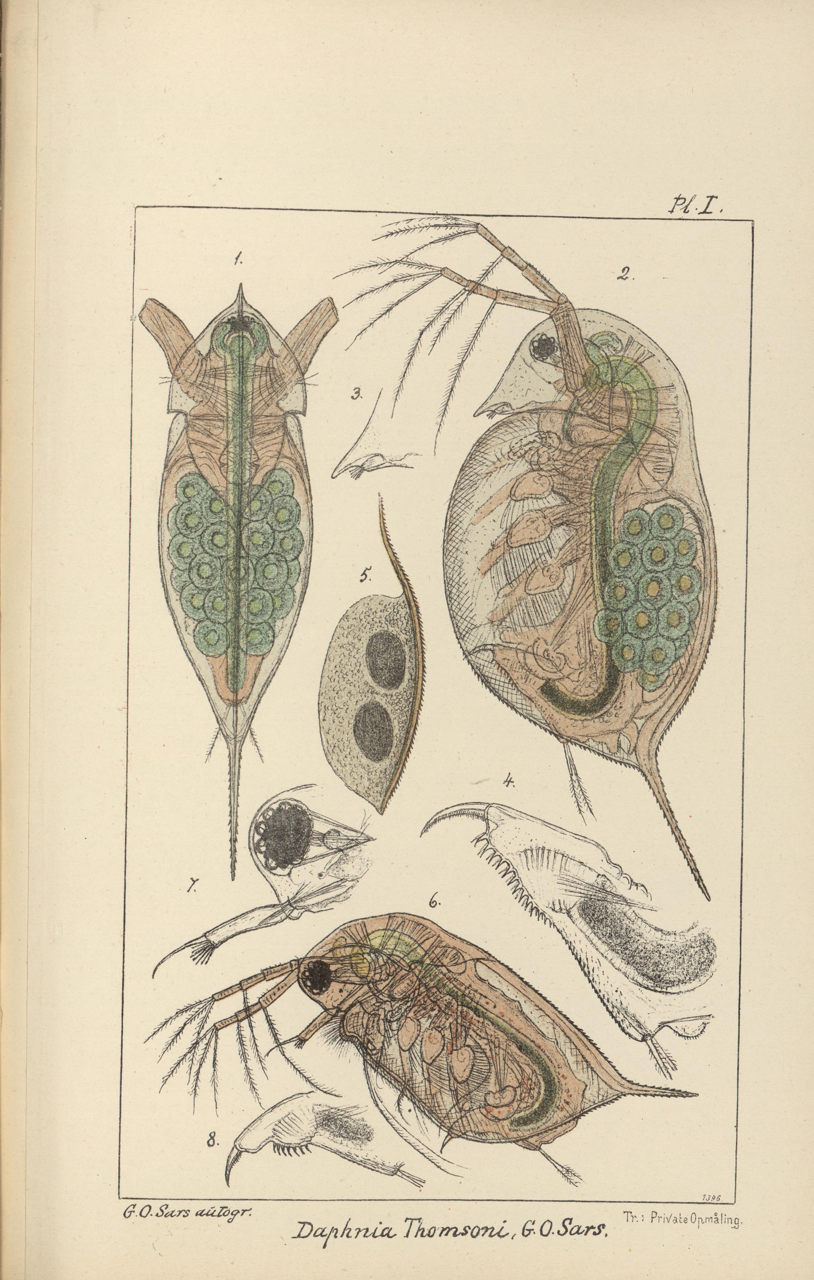 Illustrasjon hentet fra boken "Contributions to the knowledge of the fresh-water Entomostraca of New Zealand" av Sars, G.O. og utgitt av In comm. by Jacob Dybwad ( , 1894)